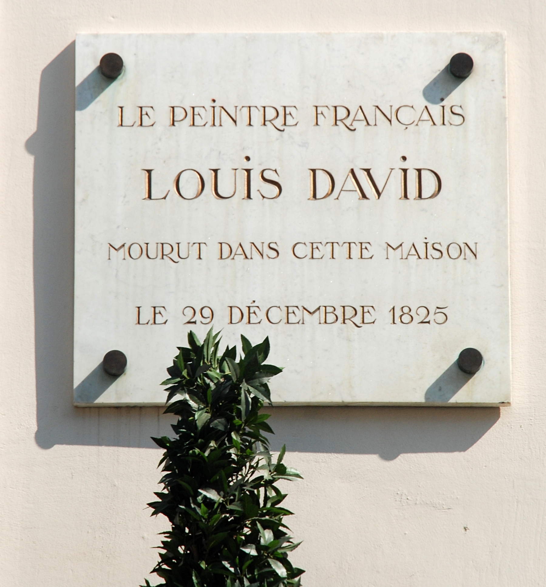 Belgique - Bruxelles - rue Léopold - plaque commémorative signalant la maison où est décédé le peintre néoclassique français Jacques-Louis David